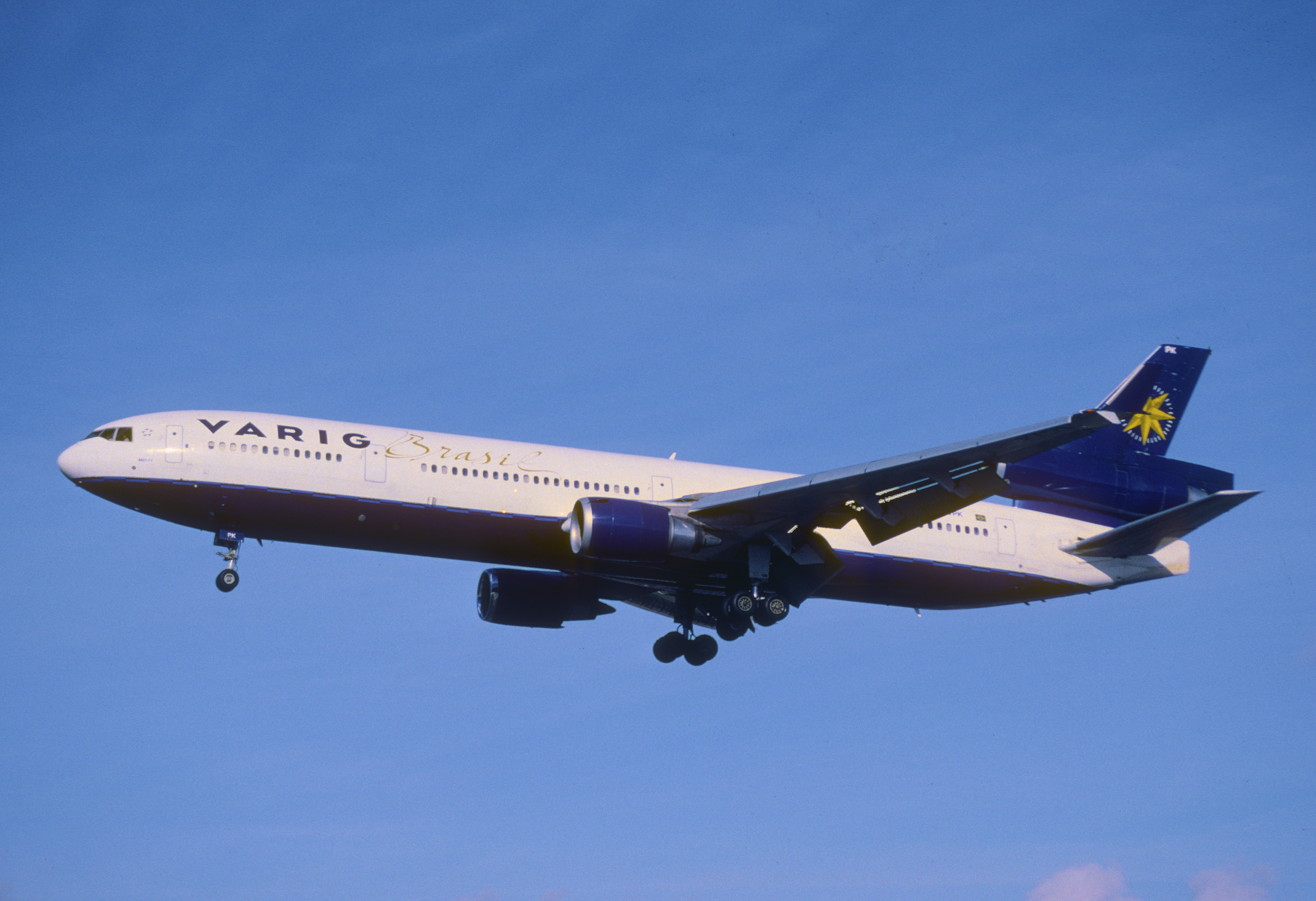 158eu - VARIG MD-11; PP-VPK@LHR;27.10.2001